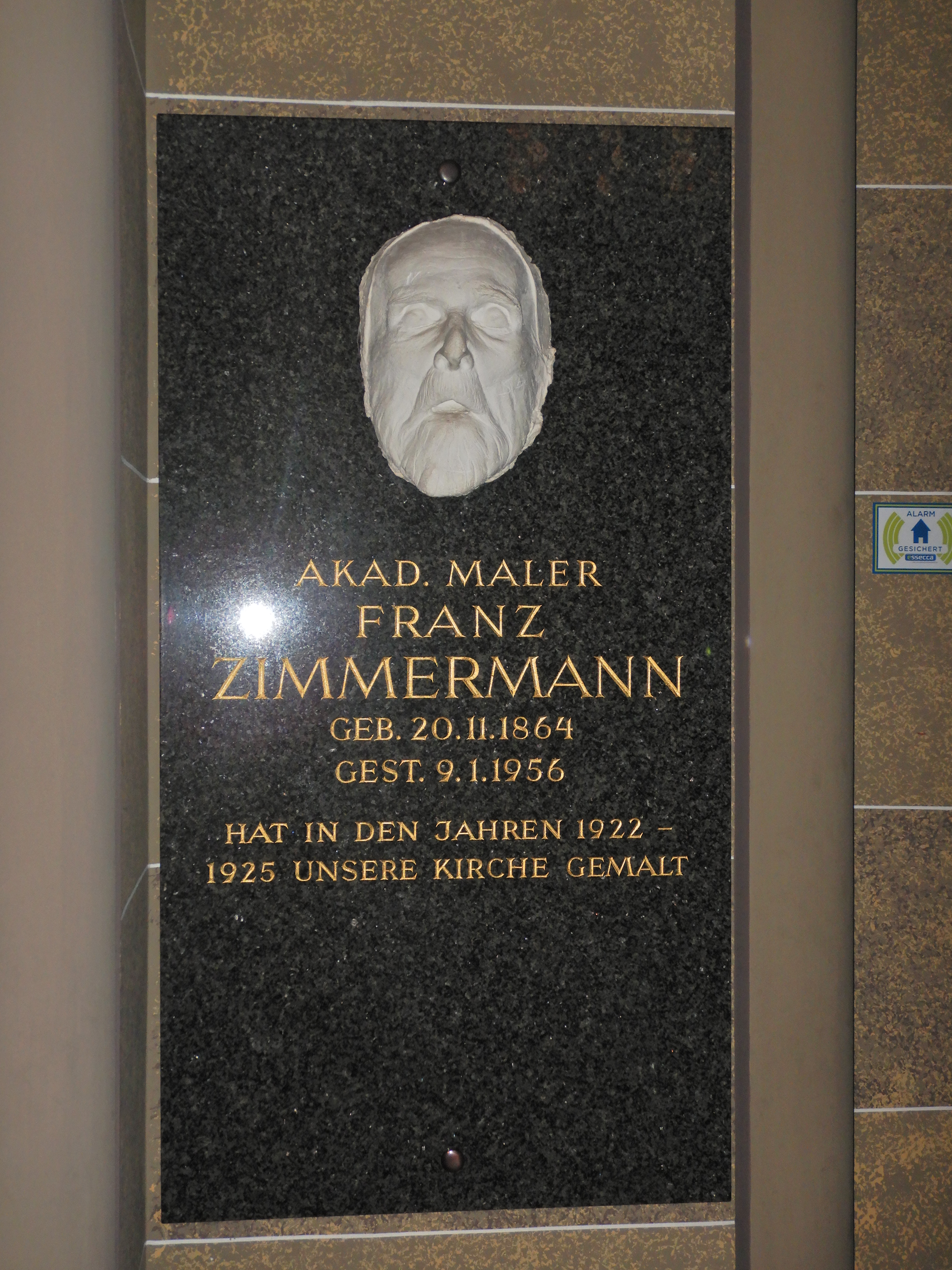 Gedenktafel für Franz Zimmermann (Wien, Victor-Braun-Platz, Kirche)